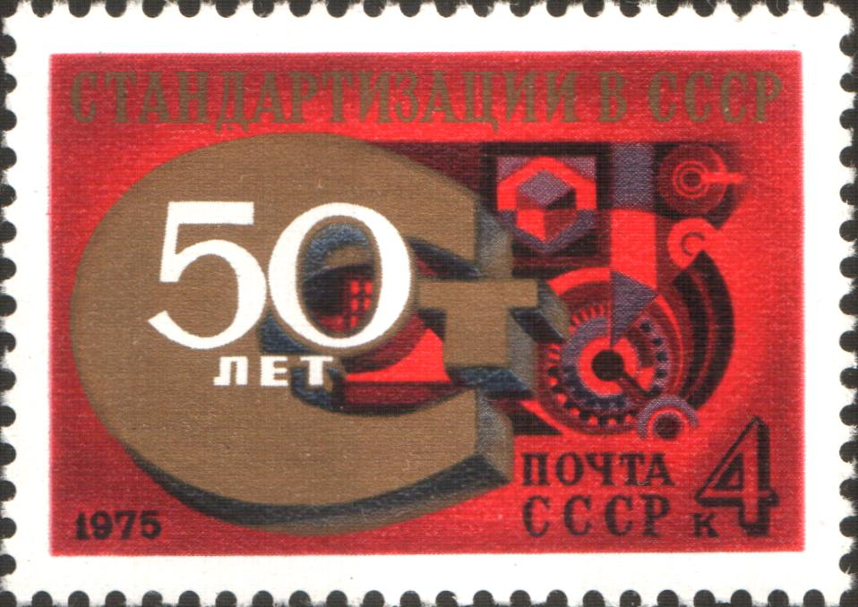 50-летие стандартизации в СССР. Художник: Р. Стрельников. Марка СССР 1975г., номинал - 4коп.